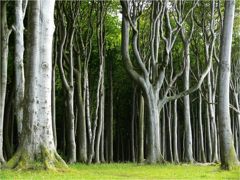 Gespensterwald bei Nienhagen